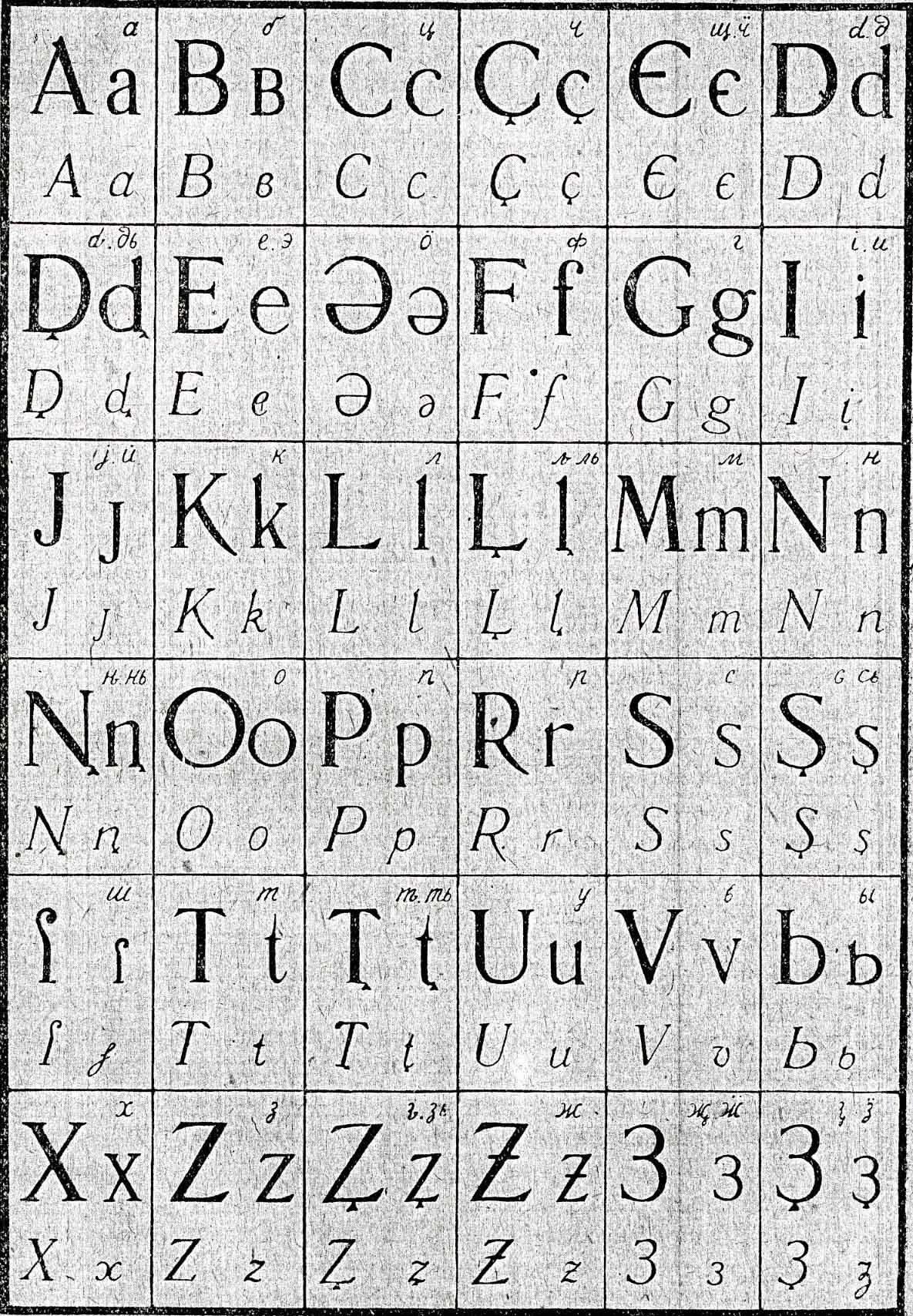 Latin alphabet for Udmurt & Komi languages (USSR, 1931)